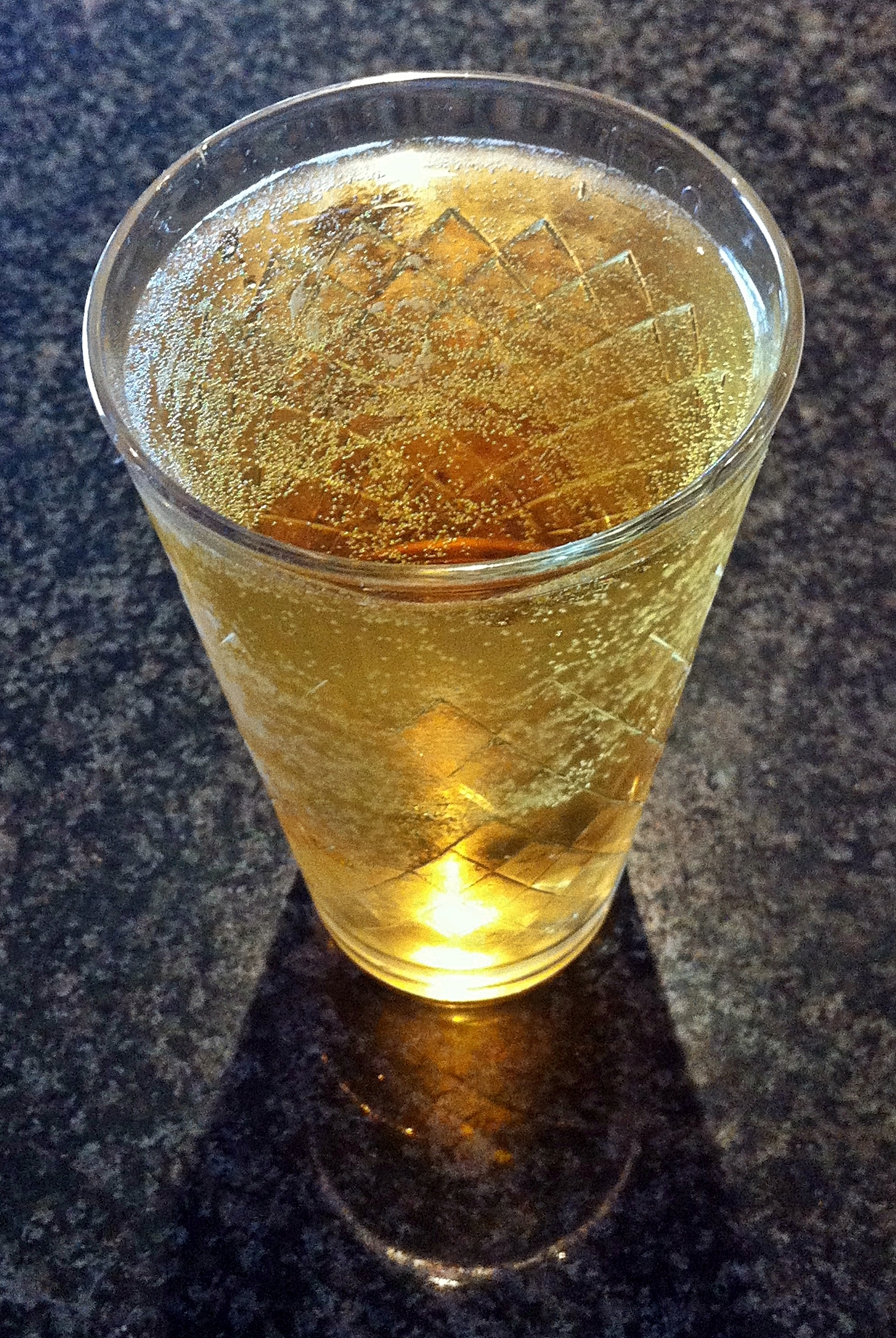 Apfelweinglas (typisches "Geripptes"), 0,25l, gefüllt mit Apfelwein